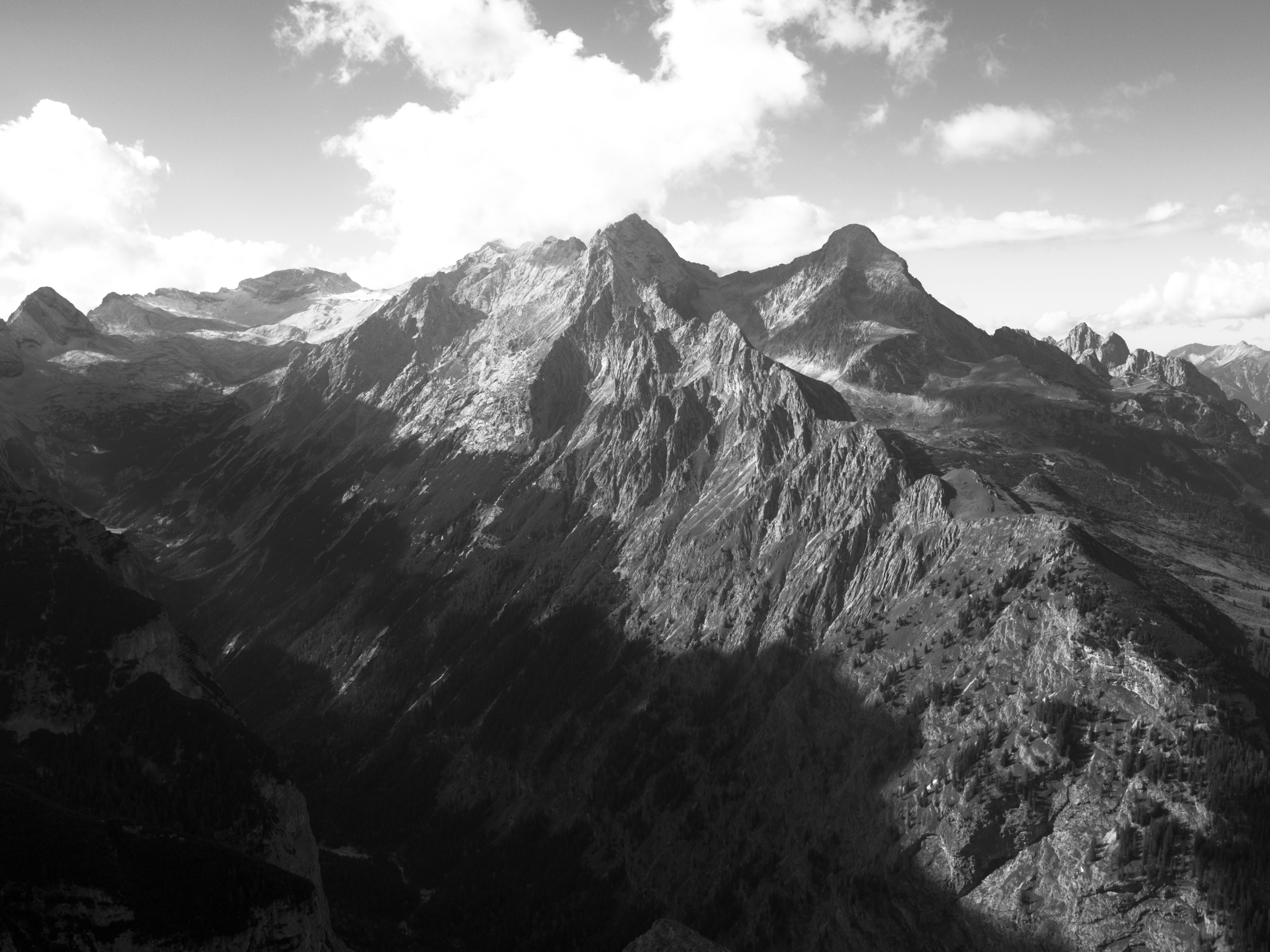 Hochblassen mit Blassengrat gesehen vom Weg zwischen Schachenhaus und Meilerhütte. Links im Bild Reintal und Zugspitzplatt, Zugspitze in Wolken. Rechts vom Hochblassen Grieskar und Alpspitze. Rechts im Bild Osterfelderkopf und Waxenstein.